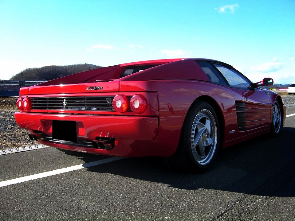 2912年12月29日 ツインリンクもてぎ オーバルコース バックストレッチ